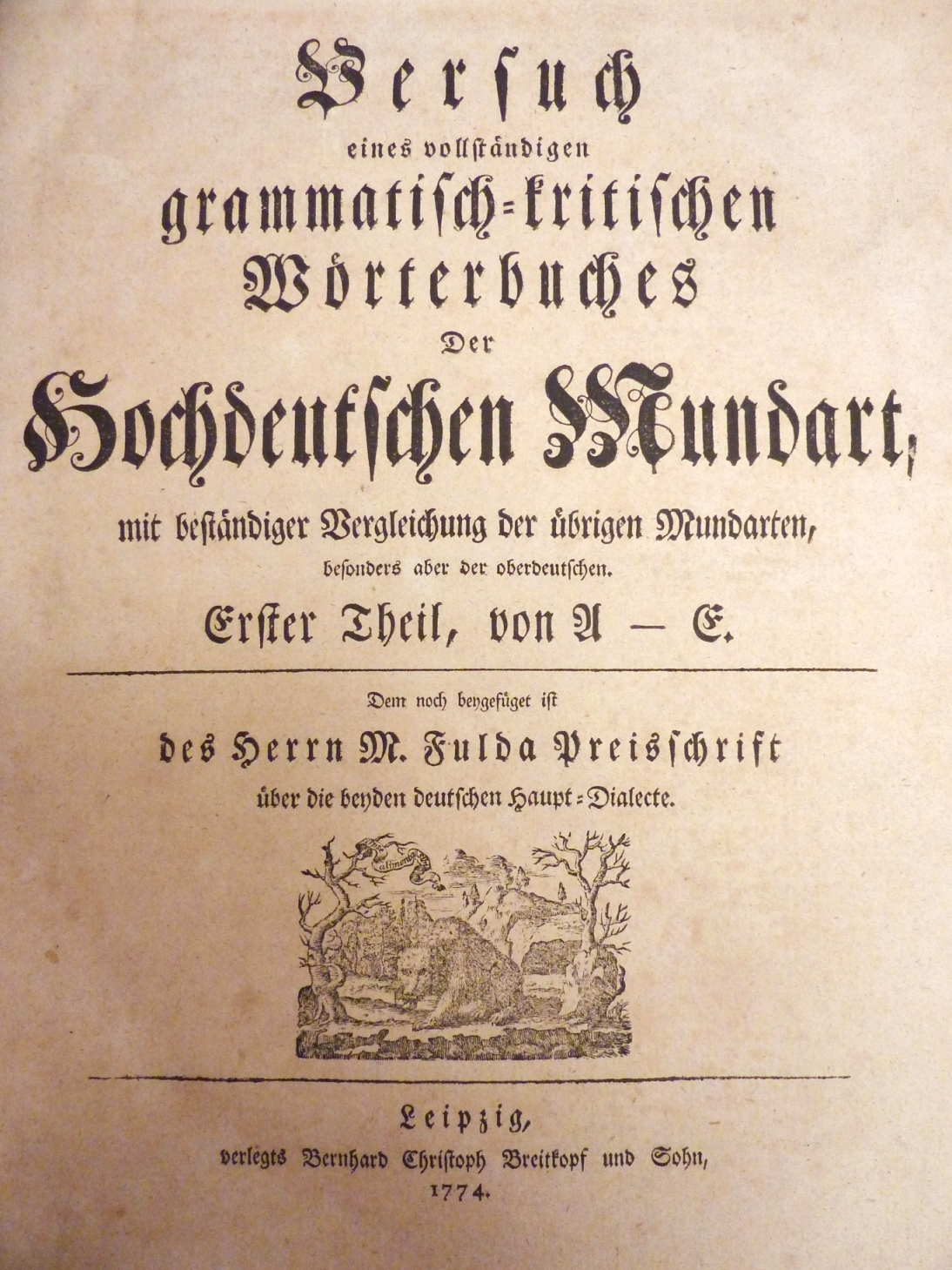 Deckblatt zur Erstausgabe von Adelungs Wörterbuch, Band 1 - A-E, Ausgabe von 1774